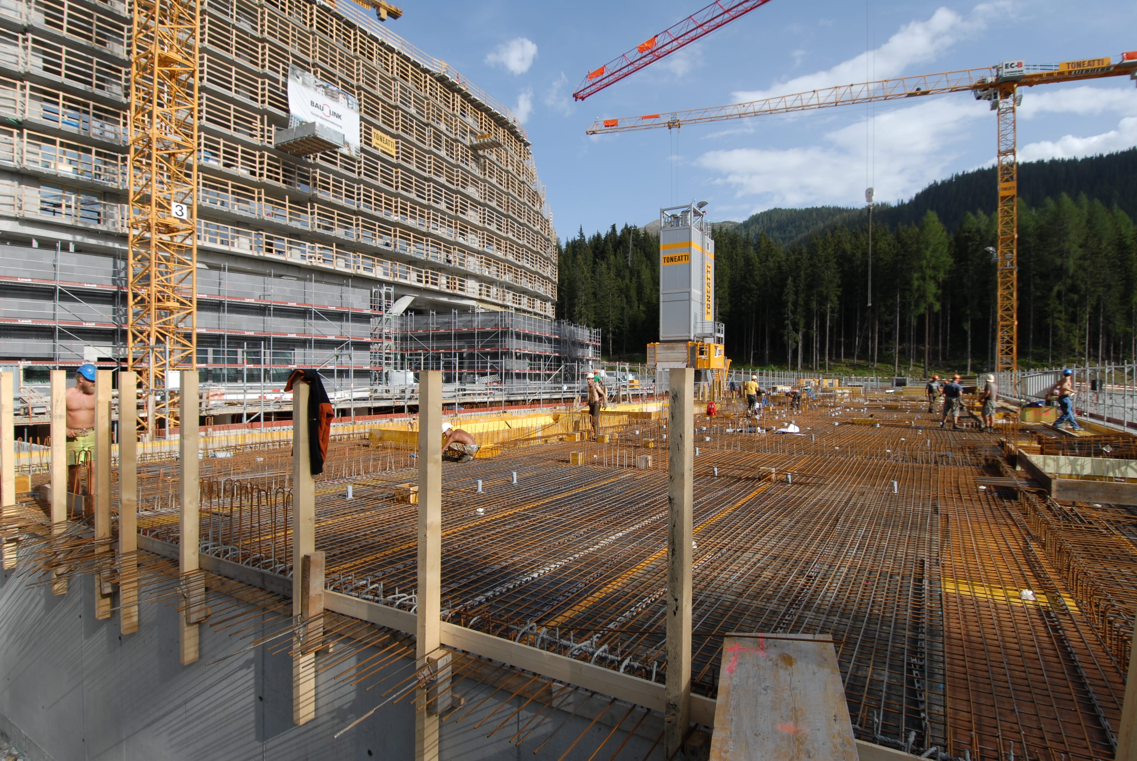 Armierung in Davos Intercontinental